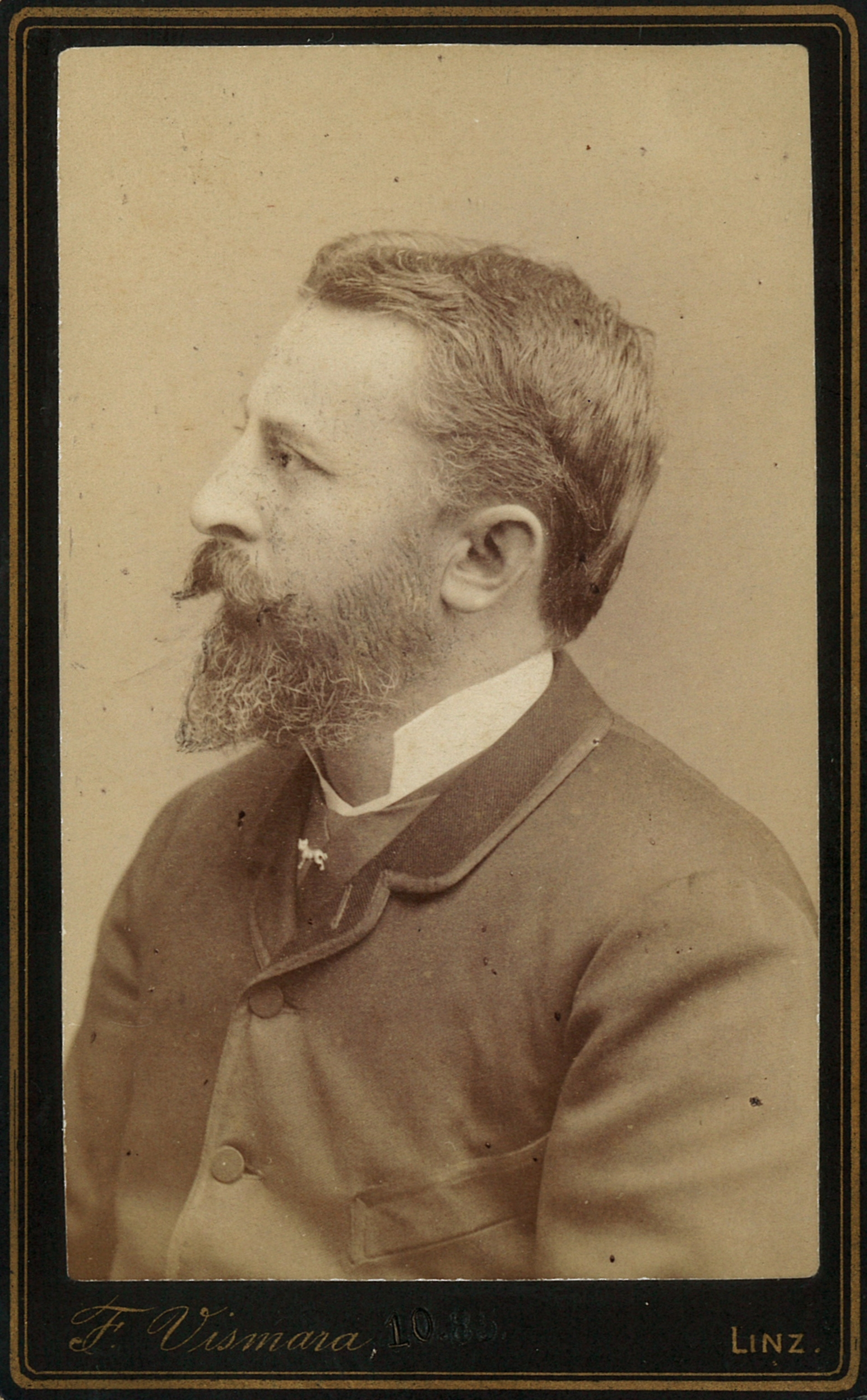 Porträtfoto von Hermann Krackowizer (1885). Beschriftung in Kurrentschrift rückseitig: "Hermann Krackowizer, Architekt u. Baumeister in Linz, 8. Nov. 1885"